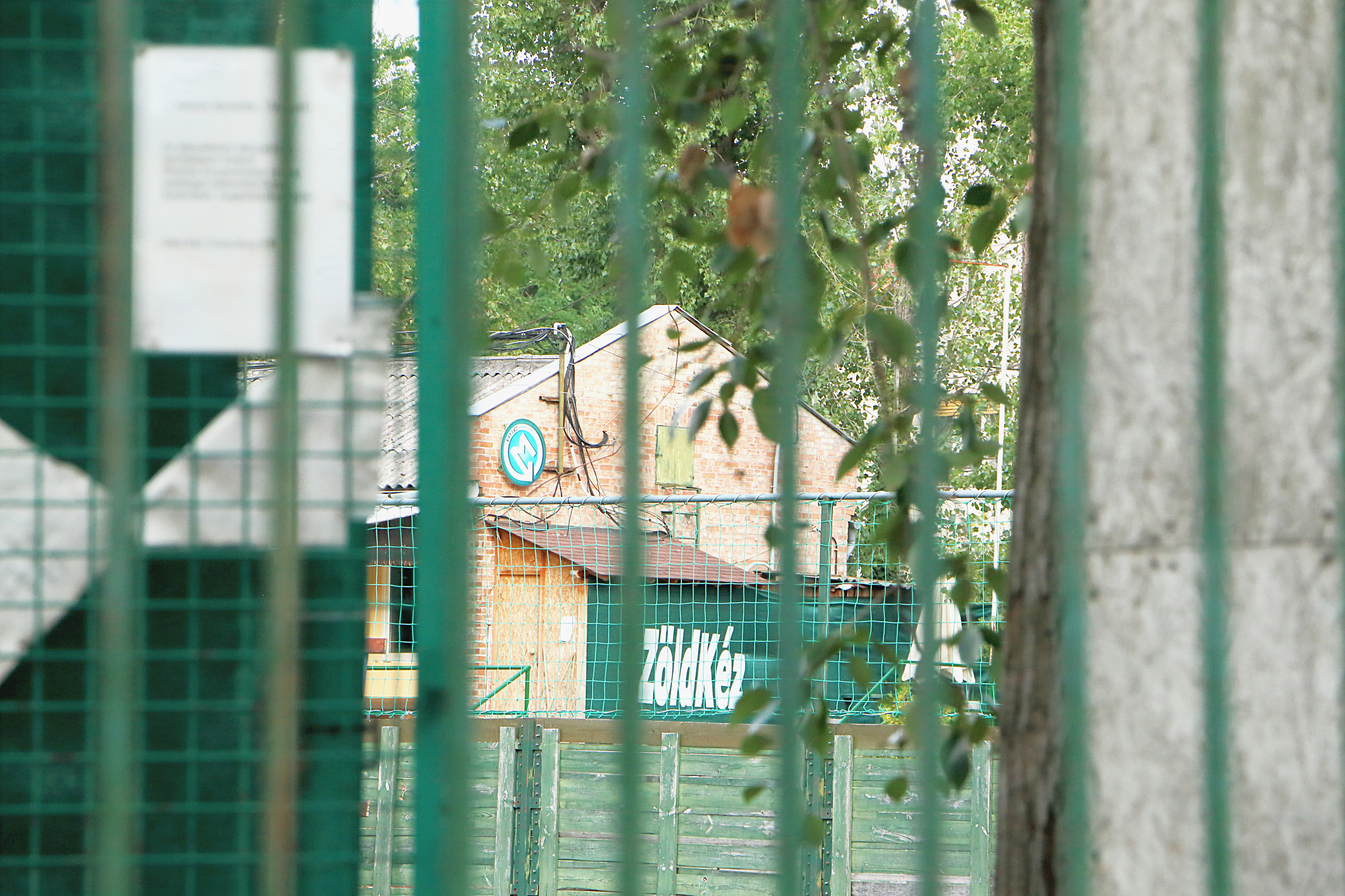 Metro RSC - ZöldKéz, Rákosszentmihály